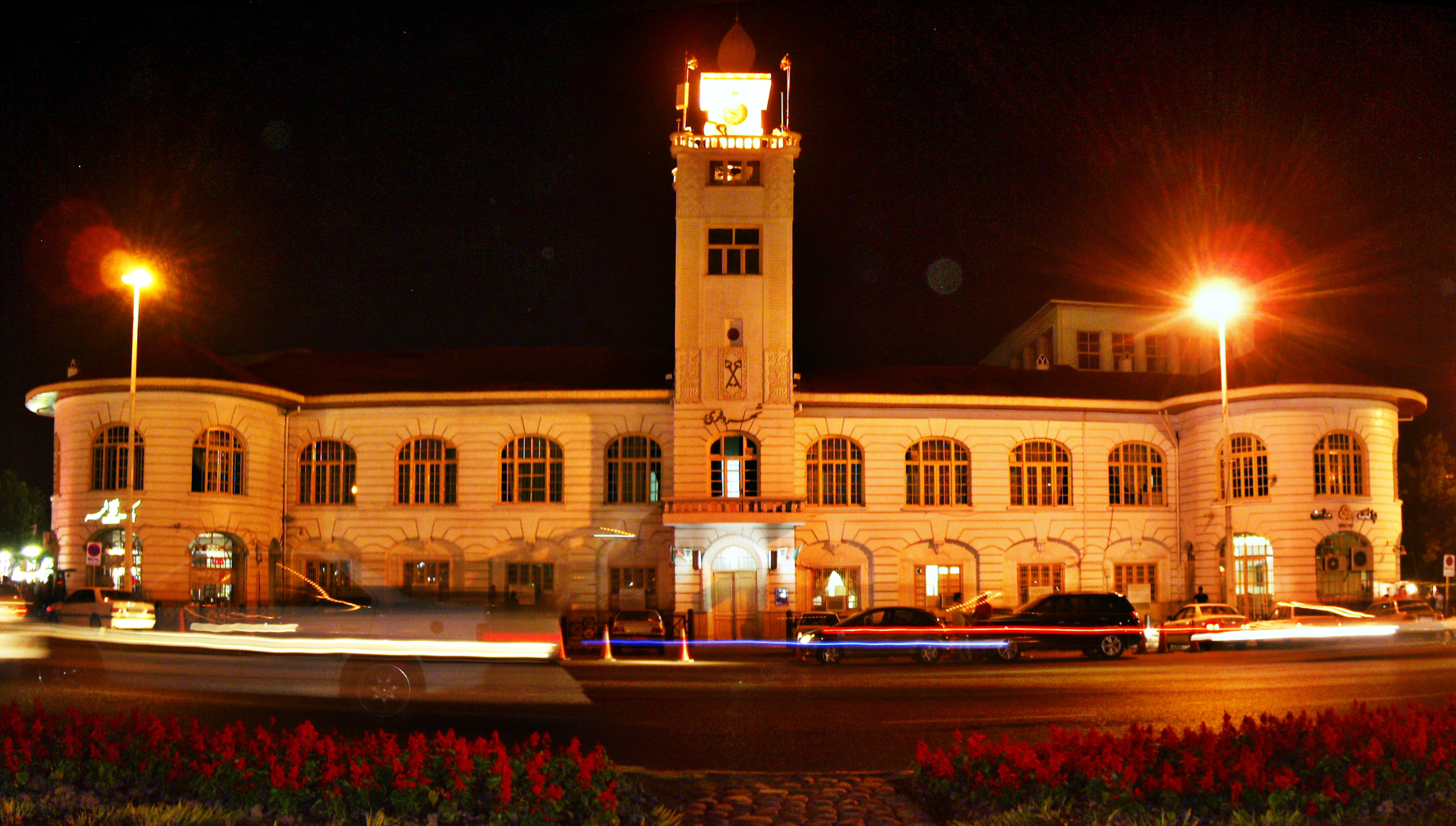 ساختمان شهرداری رشت